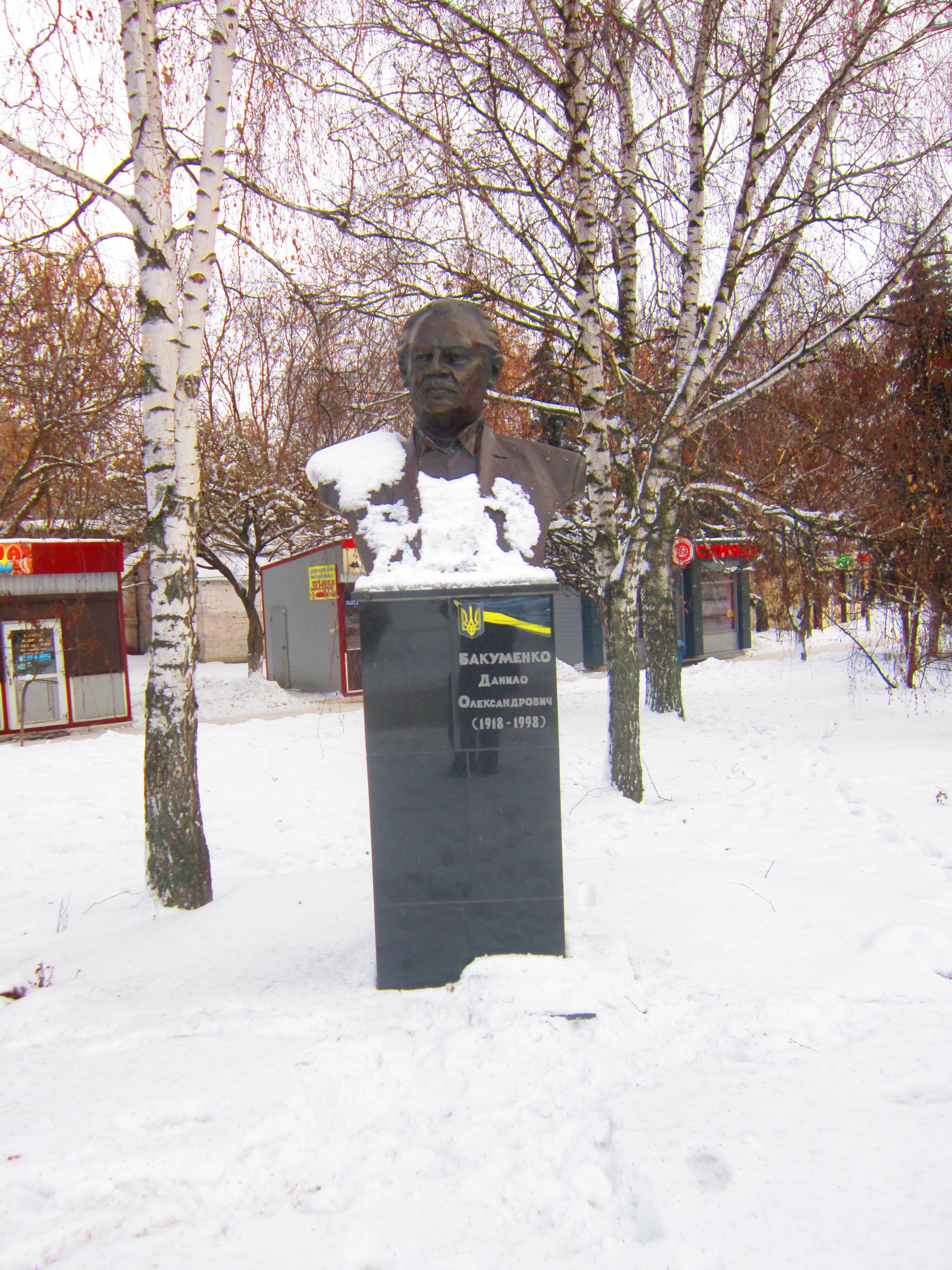 Погруддя поета Бакуменко у місті Дергачі.